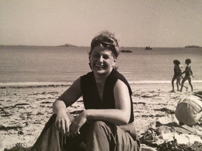 Janine Quiquandon à Carantec en 1964